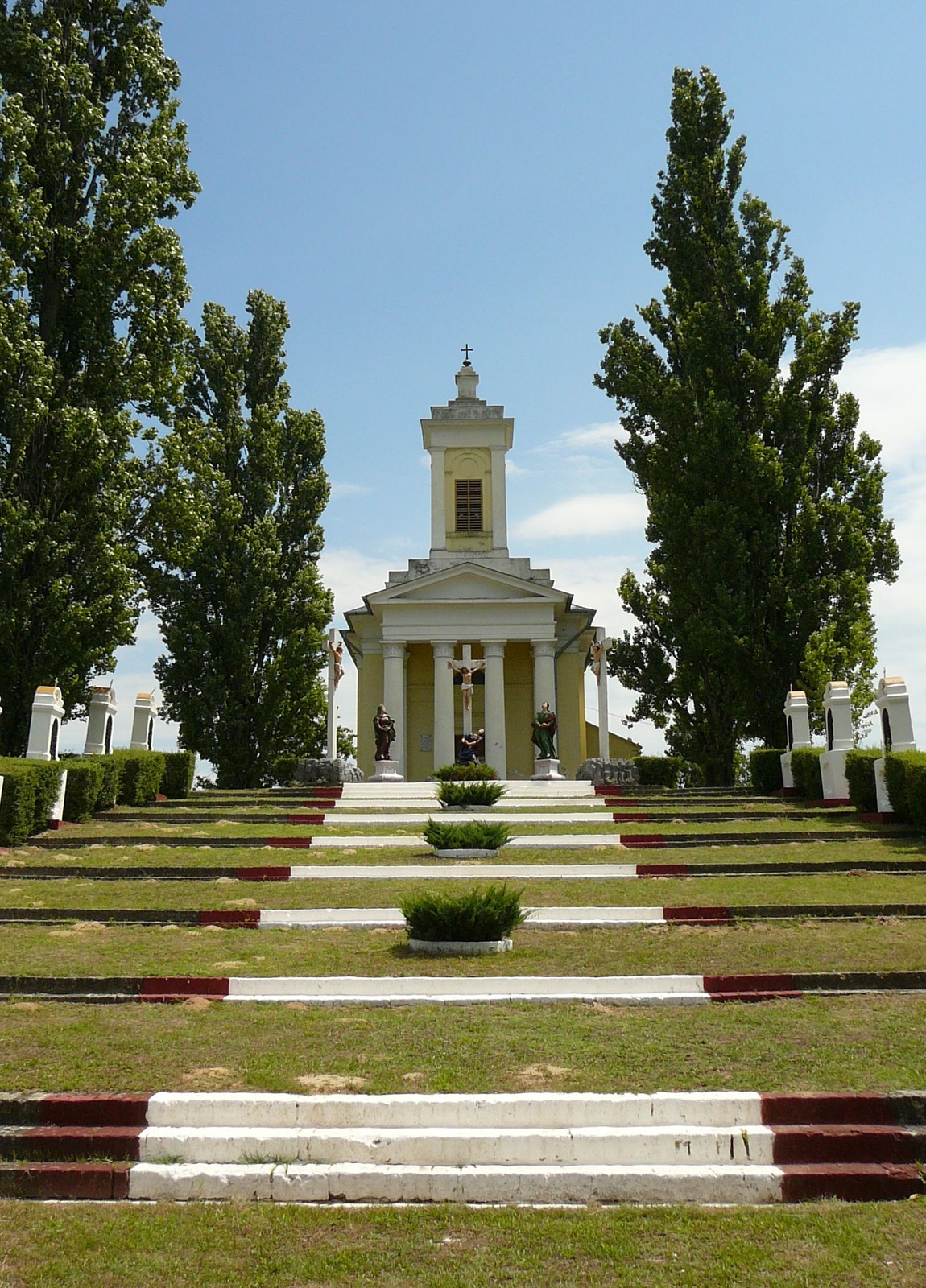 Kálvária-kápolna (Hétfájdalmú Szűz) (Baja, Kálvária utca) This is a photo of a monument in Hungary, Identifier: 2105